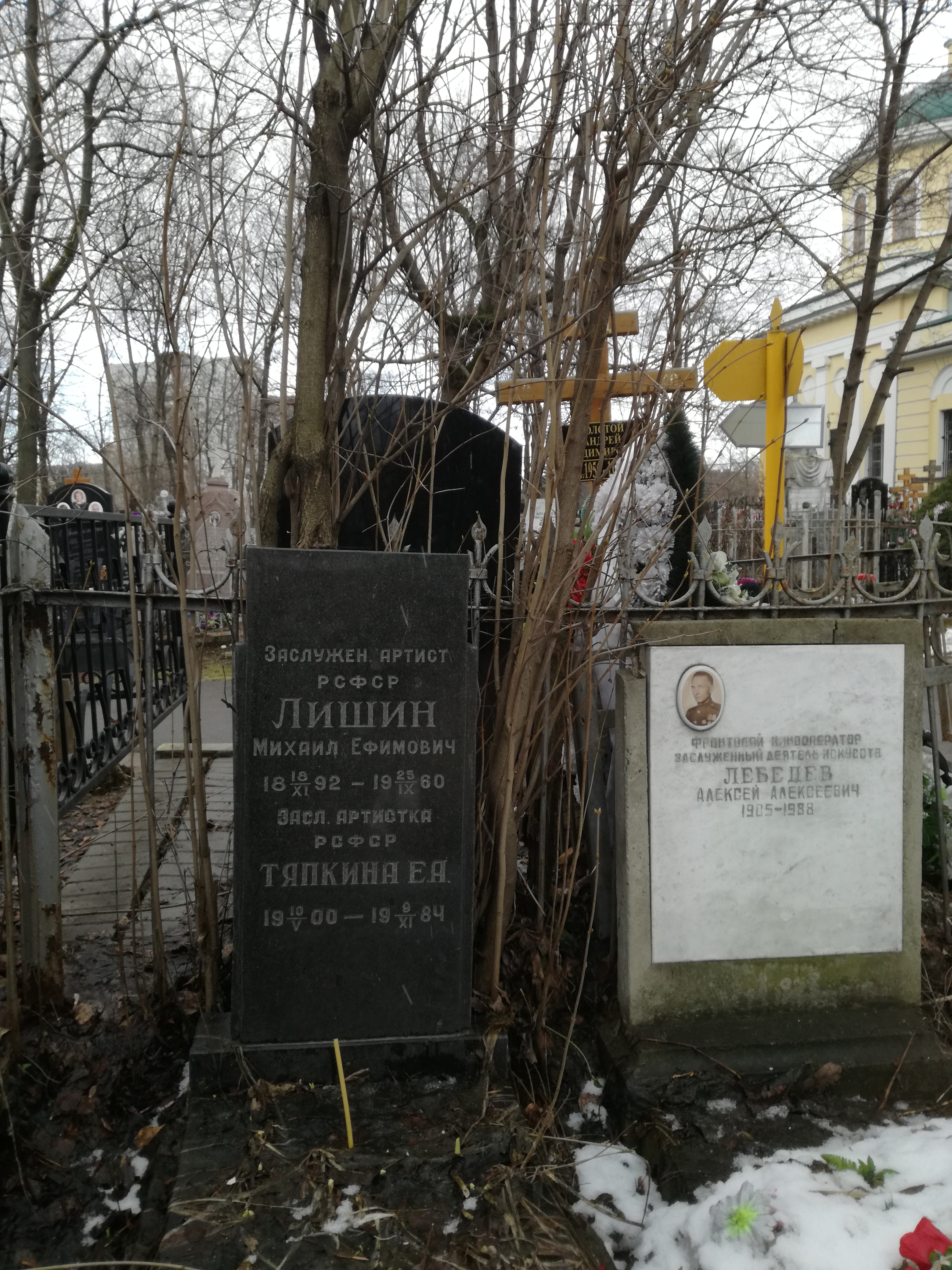 Даниловское кладбище